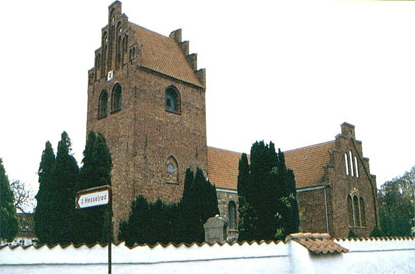 Karlebo Kirke i Danmark. Karlebo kirke